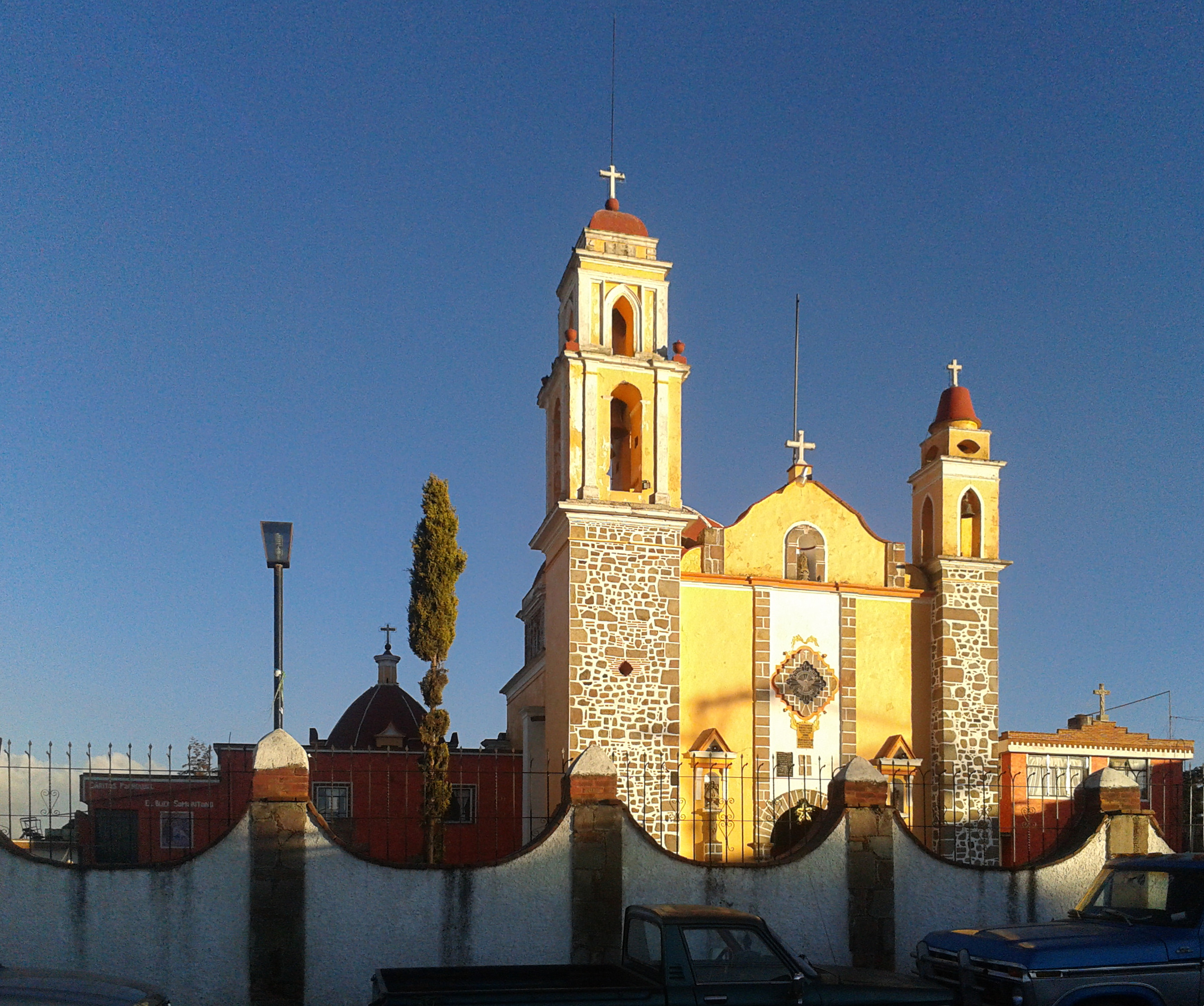 nuestra parroquia en un atardecer